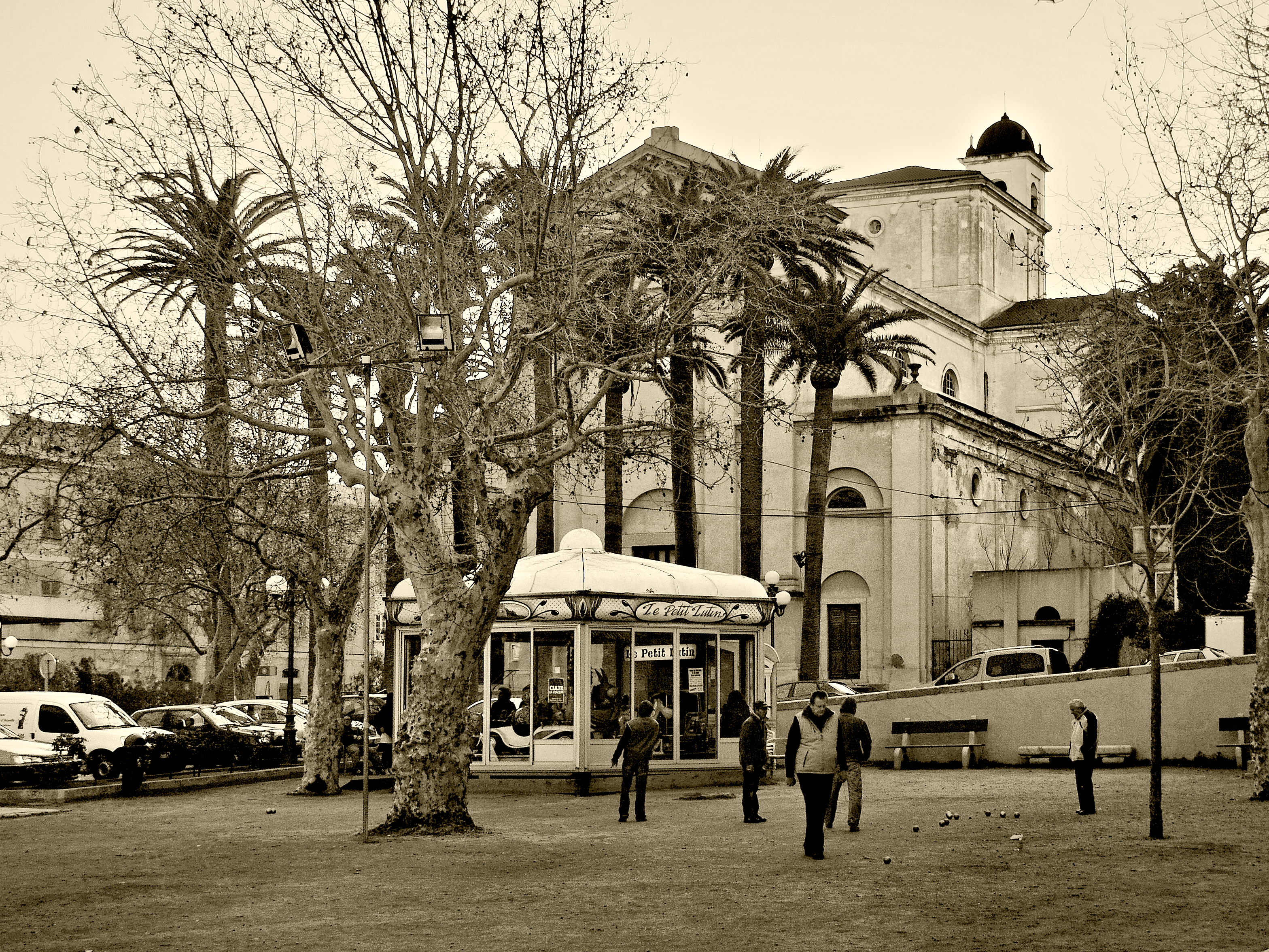 L'Île-Rousse (Corse) - L'église paroissiale de l'Immaculée Conception de Marie et joueurs de pétanque sur la place Paoli